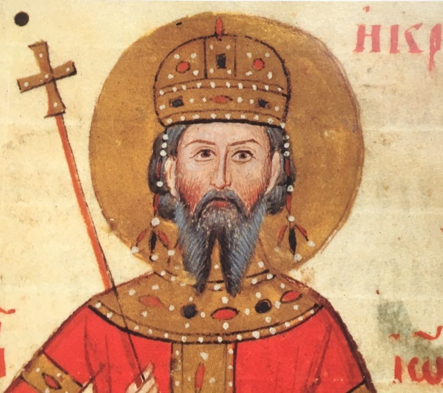 Retrato del zar Iván Alejandro en el Tetraevangelio de Iván Alejandro.